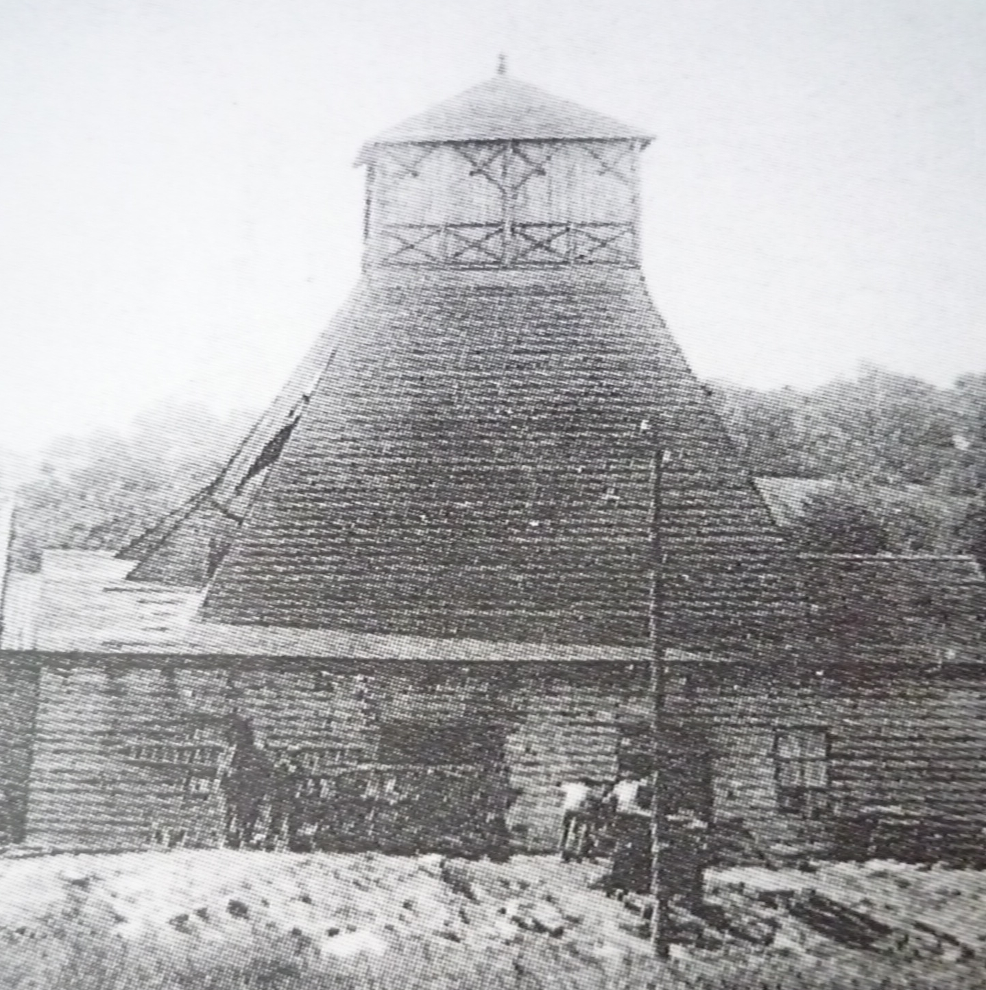 La Fosse n° 10 de la Compagnie des mines de Nœux était un charbonnage constitué d'un seul puits situé à Hersin-Coupigny, Pas-de-Calais, Nord-Pas-de-Calais, France.